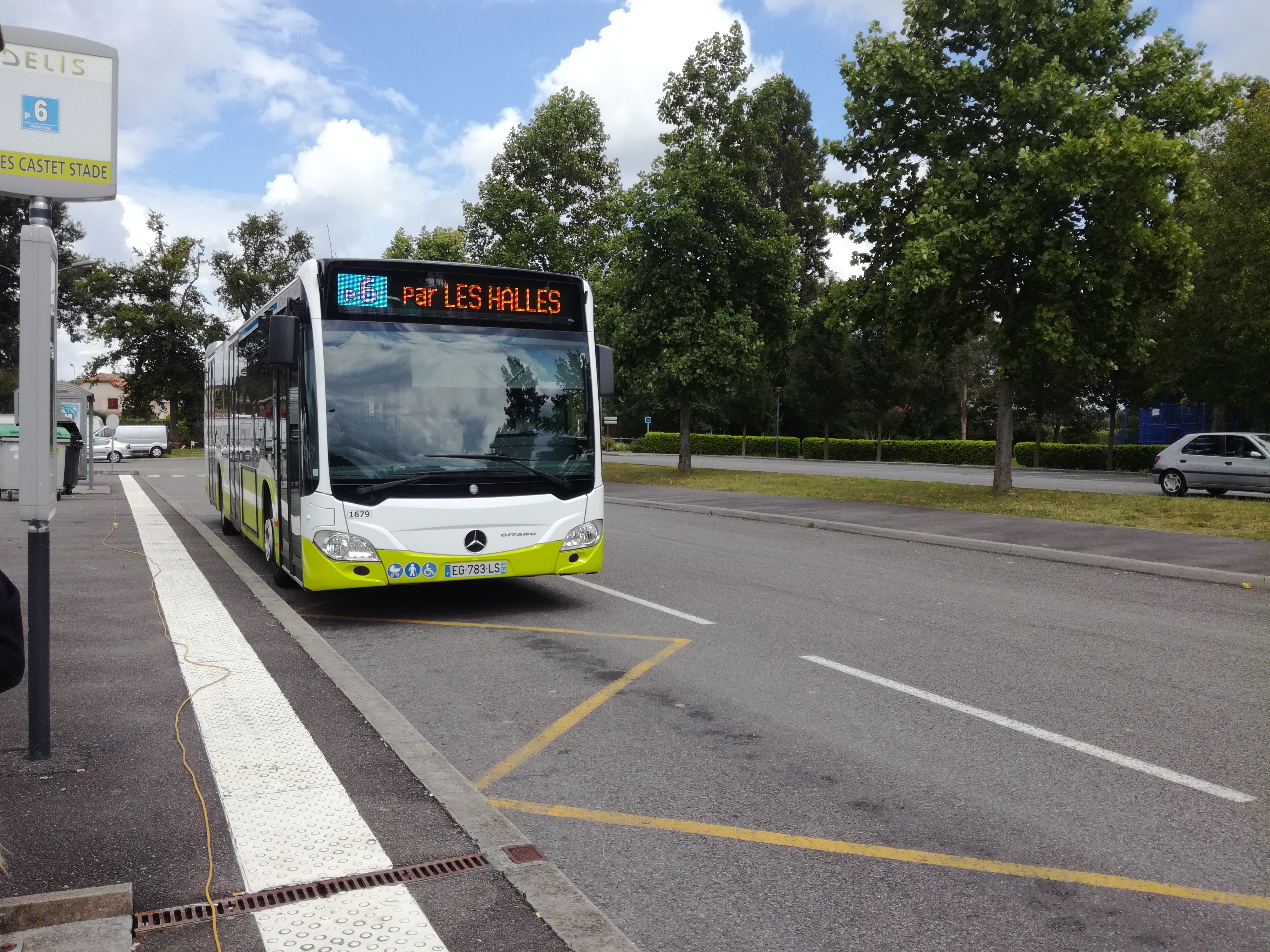 Image montrant le bus Citaro C2 n°1679 sur la Ligne P6